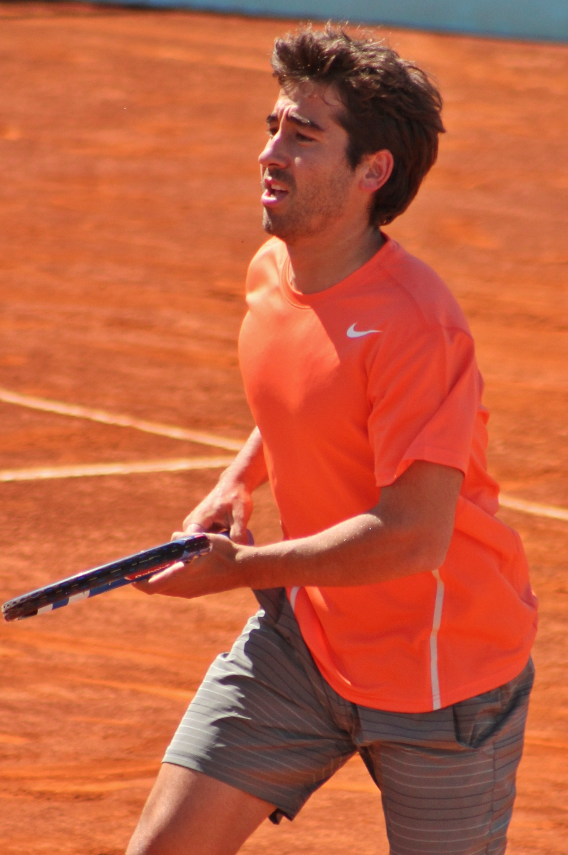 Lopez M. MA14 (5)